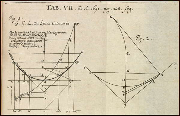 Leibnico sprendimas yra kairėje pusėje. Huygeno - iliustracija yra dešinėje. Huntington biblioteka, San Marinas, Kalifornijoja.